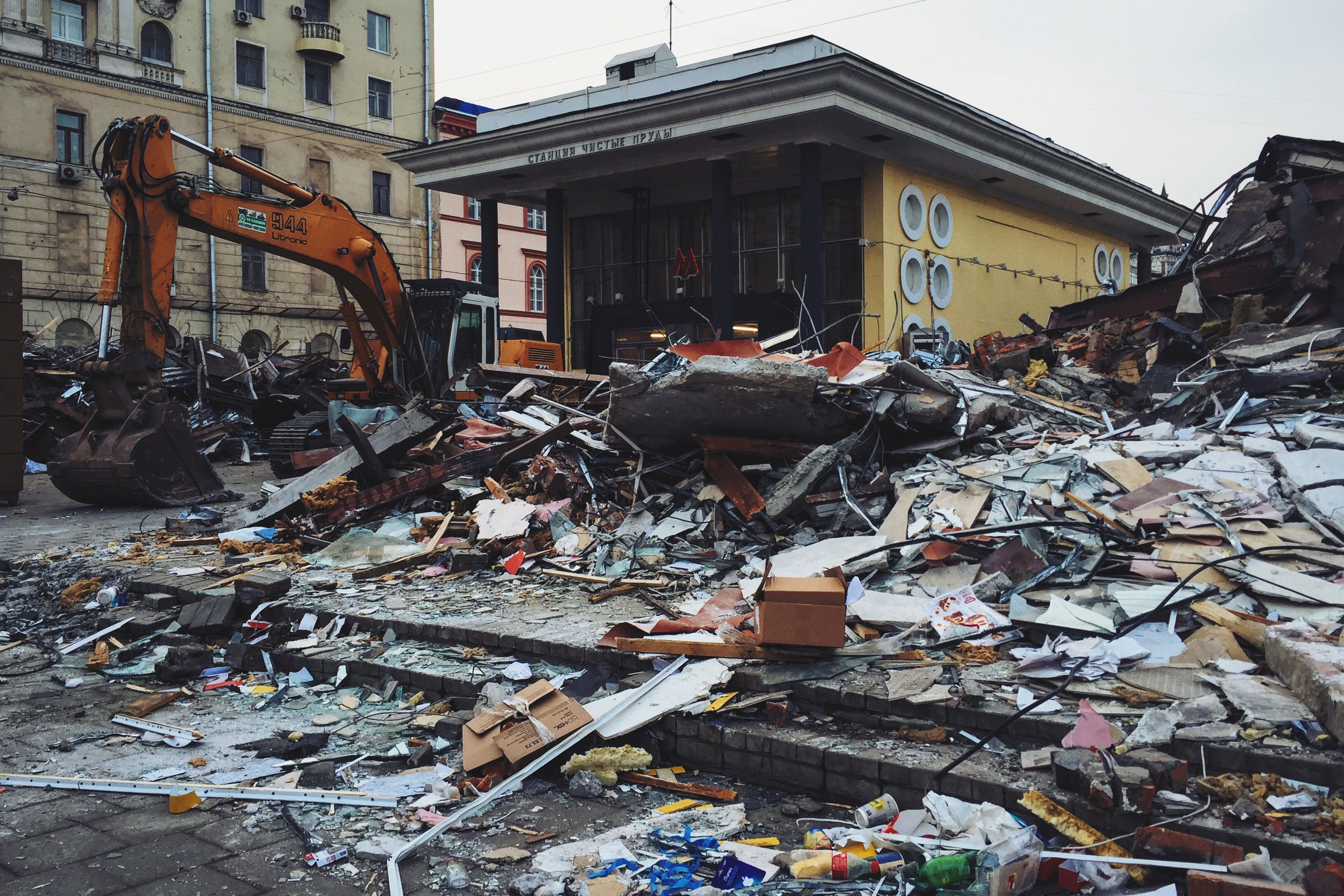 Чистопрудный бульвар Moscow in 2016; Москва в 2016